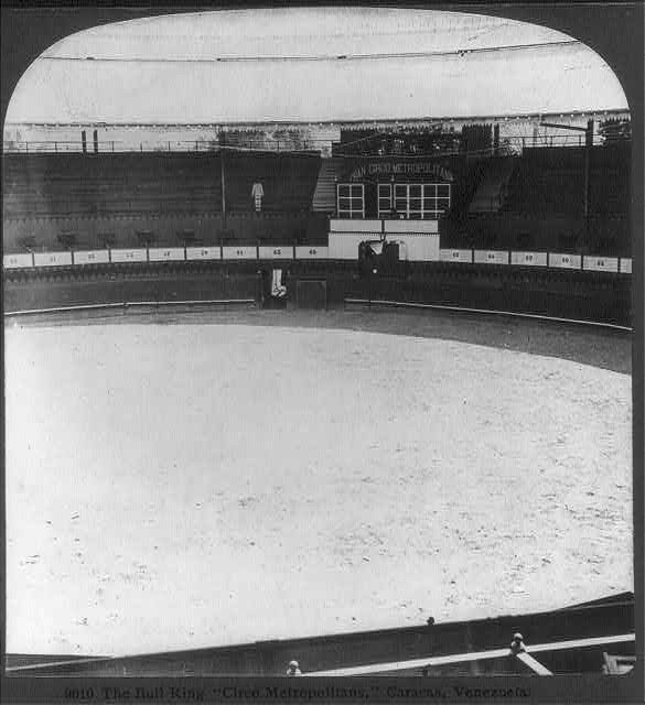 Venezuela: The Bull Ring "Circo Metropolitans," Caracas